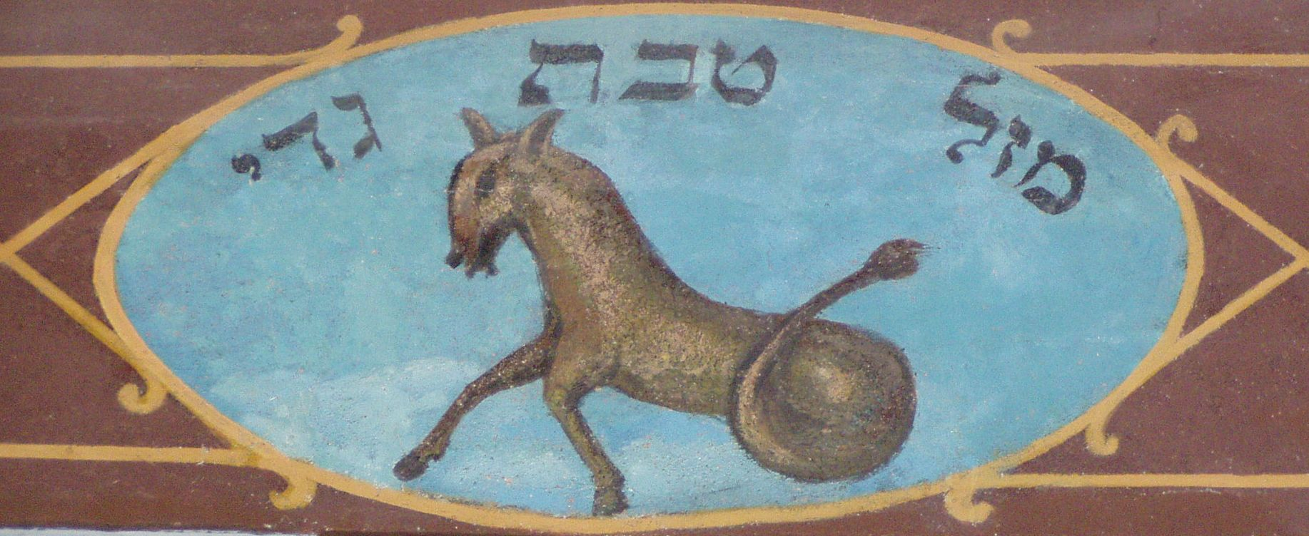 Znaki zodiaku na belkowaniu galerii dla kobiet synagogi Kupa w Krakowie